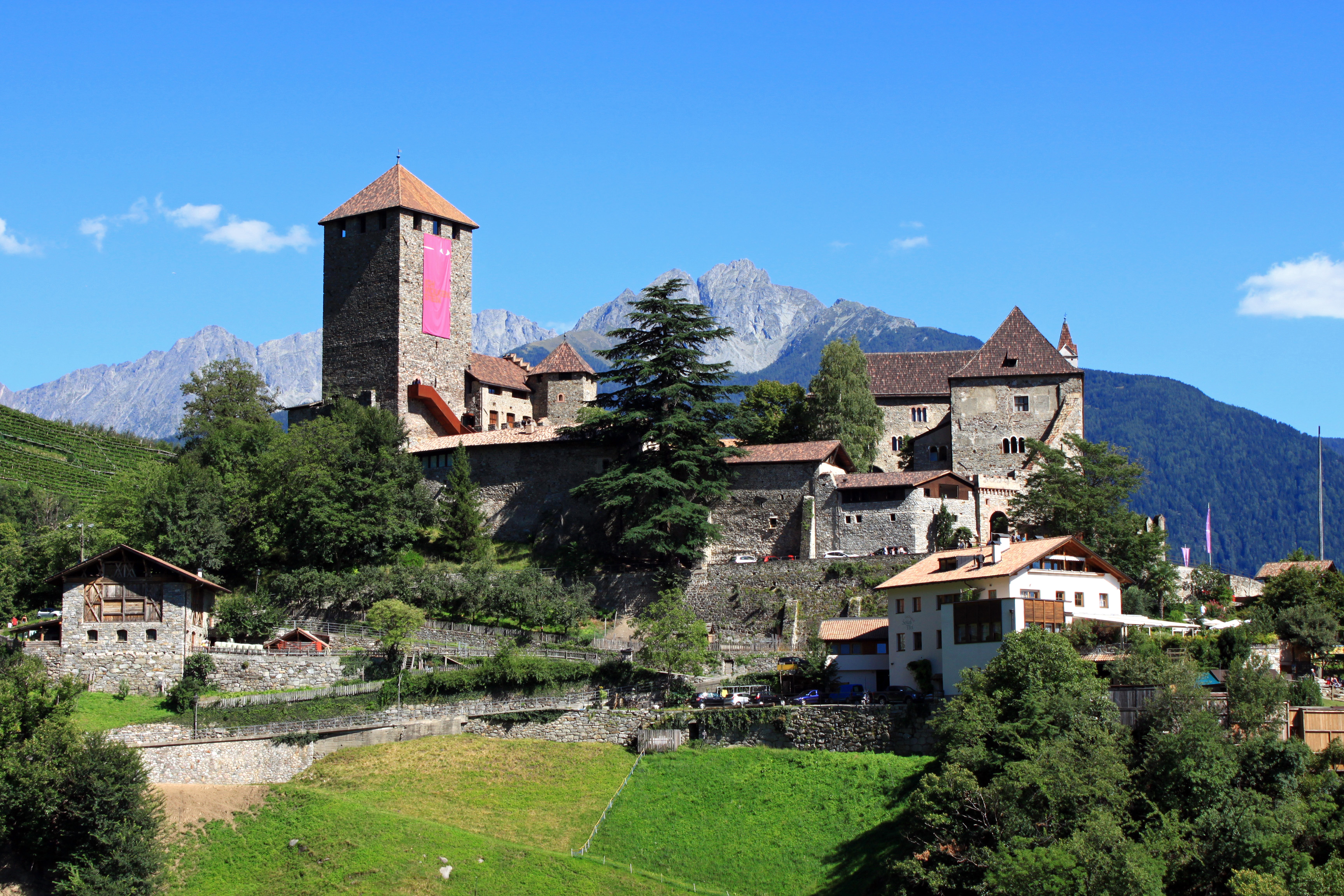 Schloss Tirol oberhalb von Algund im italienischen Südtirol.